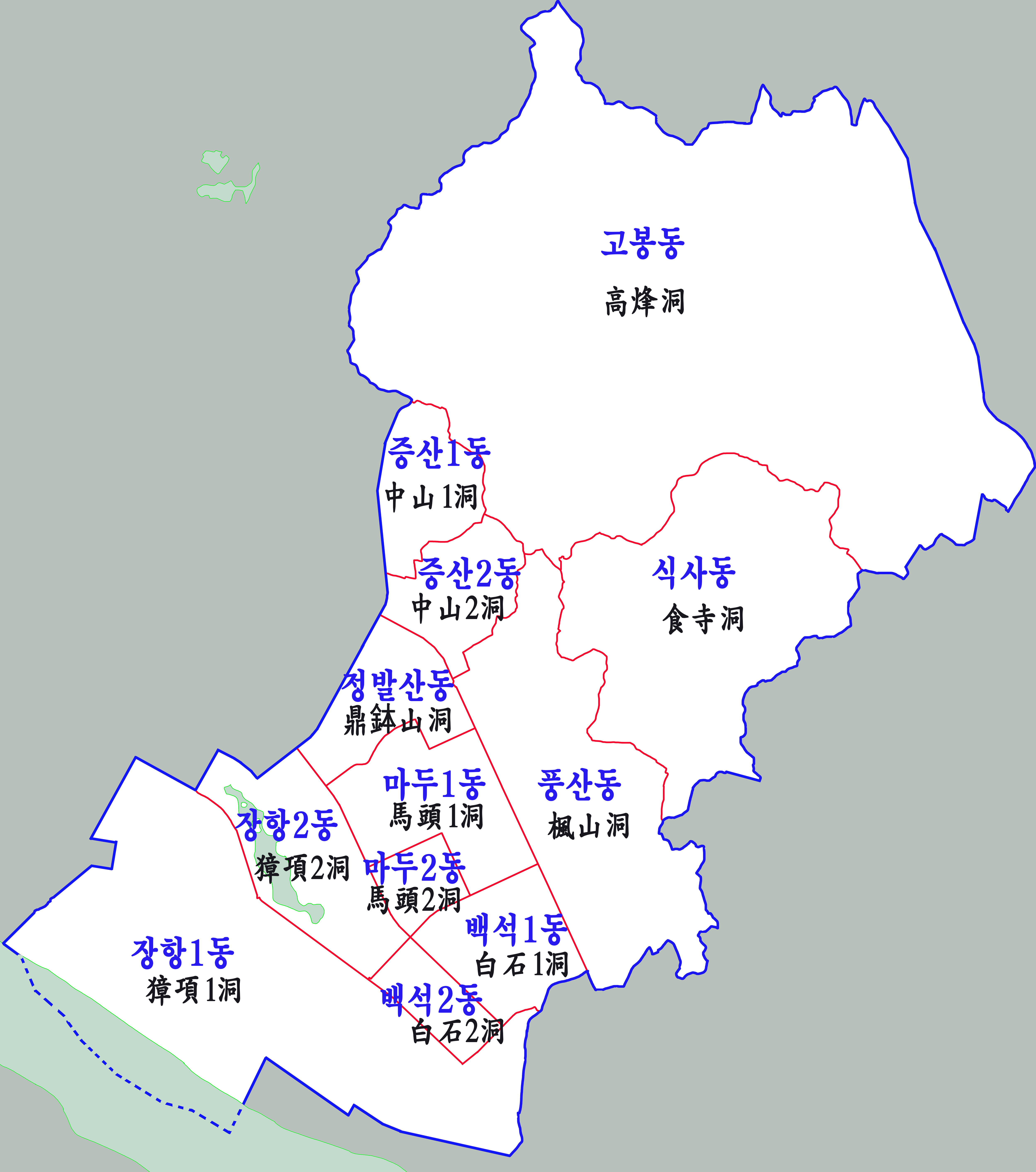 고양시 일산동구 행정구역도